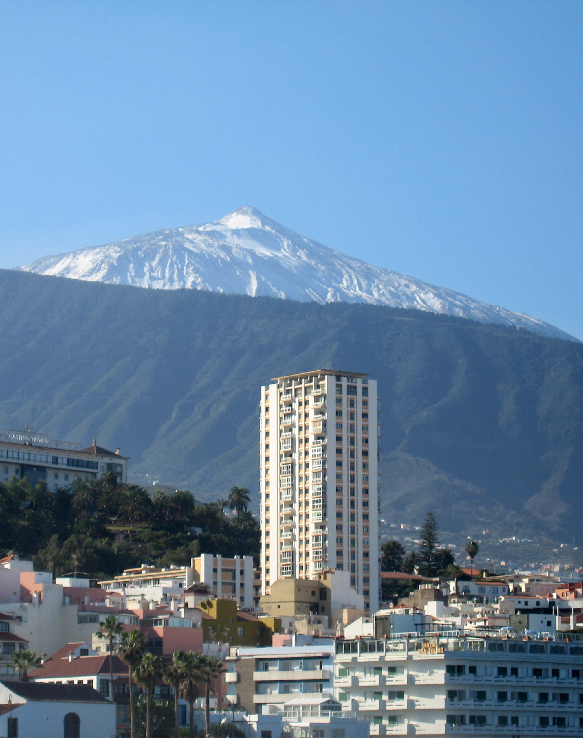 Teide on Tenerife, 2007, view from Puerto de la Cruz